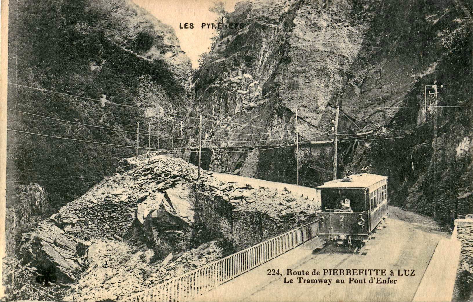 Carte postale ancienne éditée par MTIL, collection Les Pyrénées, n°224 :Route de Pierrefitte à Luz - Le Tramway au Pont d'Enfer